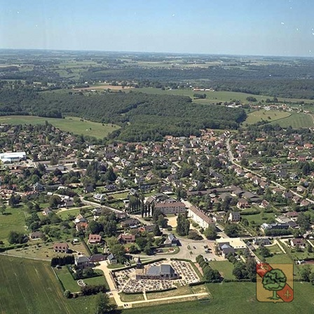 Photo aérienne de Houppeville (Paris-Normandie)